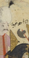 Bıyıklı Mehmet Paşa'nın Tacü't-Tevarih'de yer alan minyatürü.